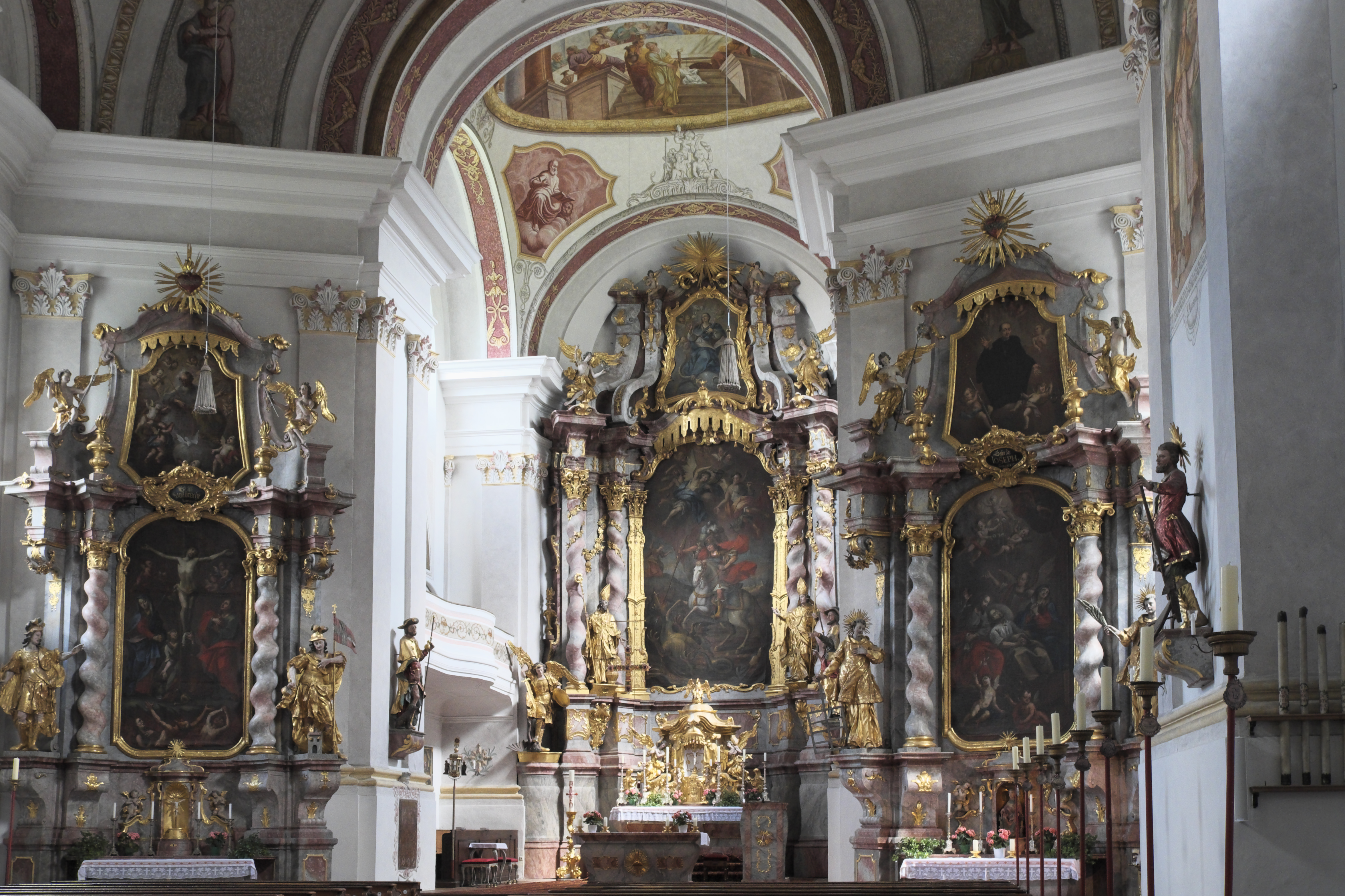 Katholische Pfarrkirche St. Georg in Ruhpolding im Landkreis Traunstein (Bayern/Deutschland), Innenraum